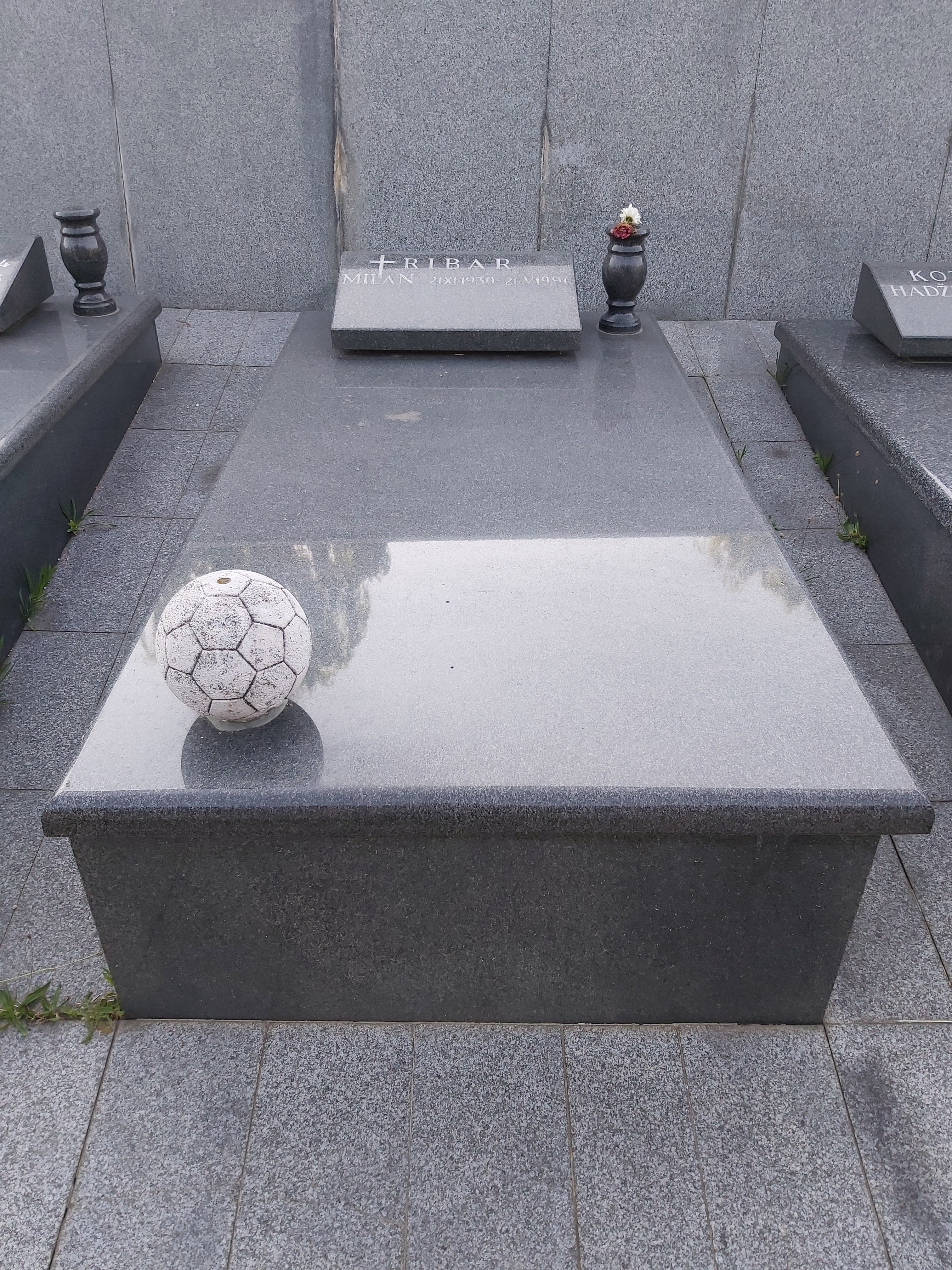 Groblje Bare